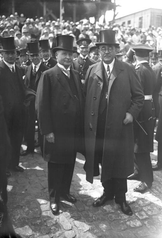 10 Jahre deutsche Reichswehr! Am 1. Januar 1931 werden es 10 Jahre , dass die deutsche Reichswehr neu geschaffen wurde. Der erste Reichswehrminister Gustav Noske (rechts) und der jetzige Reichswehrminister Groener.